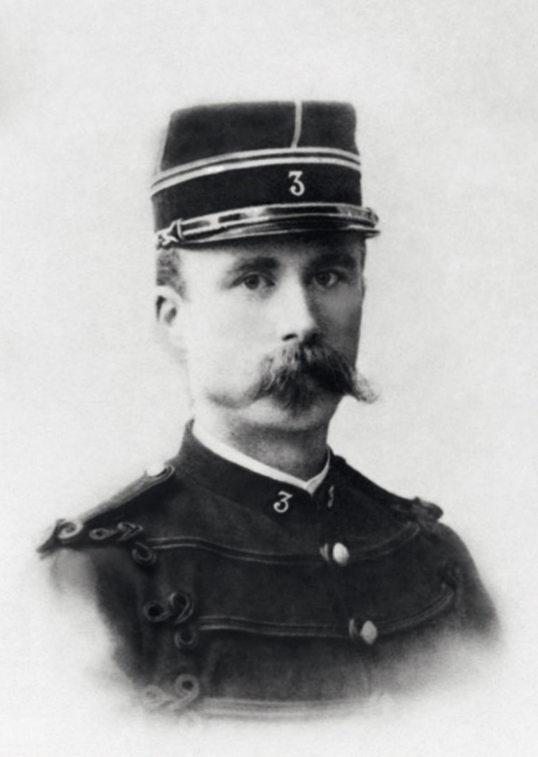 Photographie de Philippe Pétain publiée dans l'article « Le maréchal Pétain. L'organisateur de la victoire » (L'Illustration, 1918). La légende de la photographie présente l'officier comme « Le lieutenant de chasseurs à pied Pétain » [1]. La photo est reproduite dans le cahier d'illustrations hors texte de l'ouvrage de Bénédicte Vergez-Chaignon, Pétain, Paris, Perrin, 2014 (ISBN 978-2-262-03885-4).